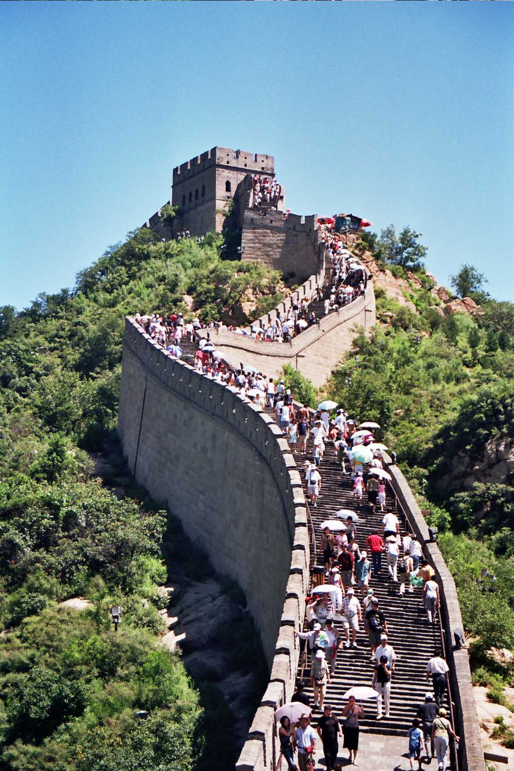 Aspecto general de la Gran Muralla China en el tramo de Badaling. Fotografía tomada en agosto del 2004